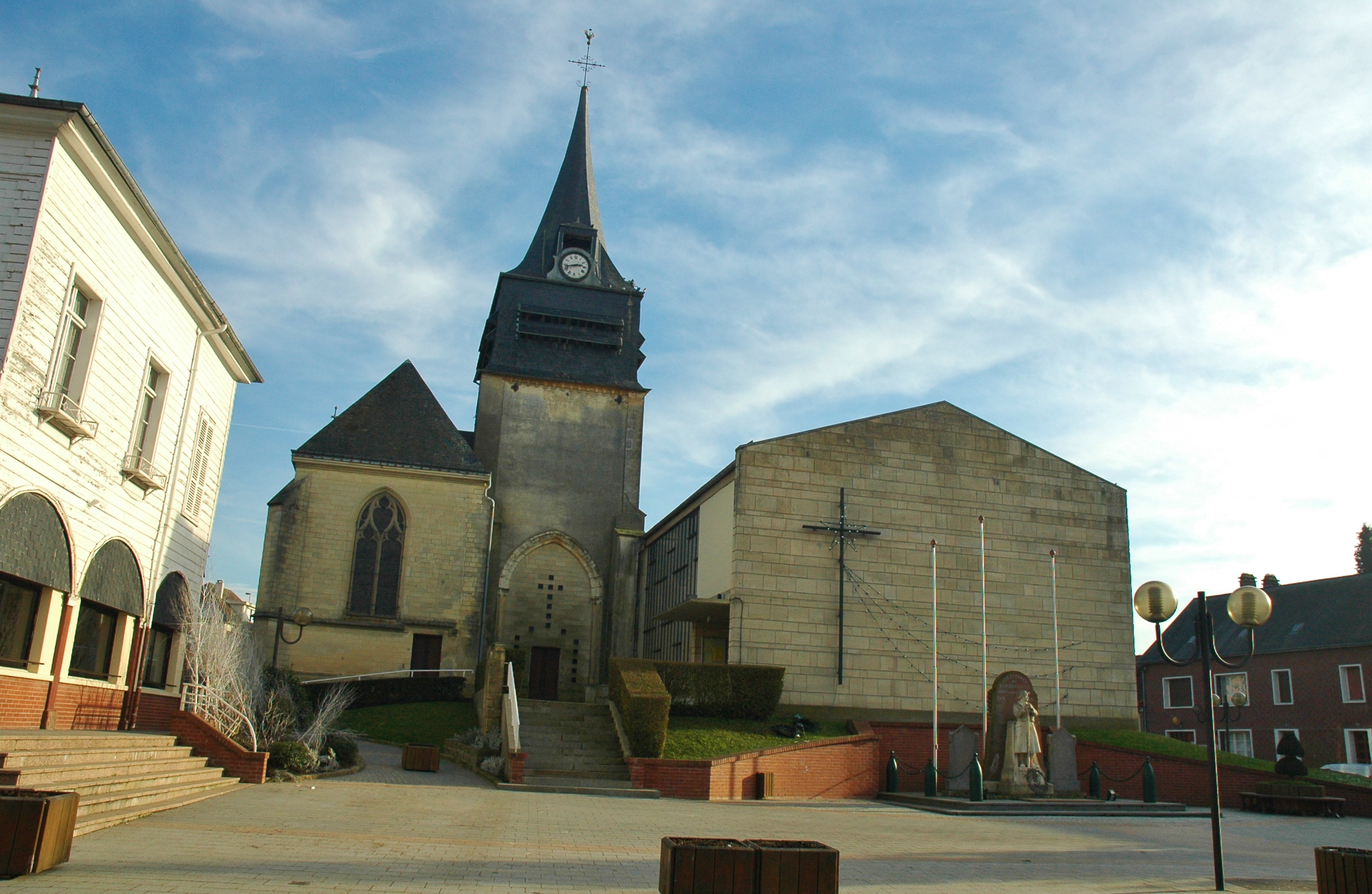 Londinières (Seine-Maritime, France). La place de l'église avec le monument aux morts.